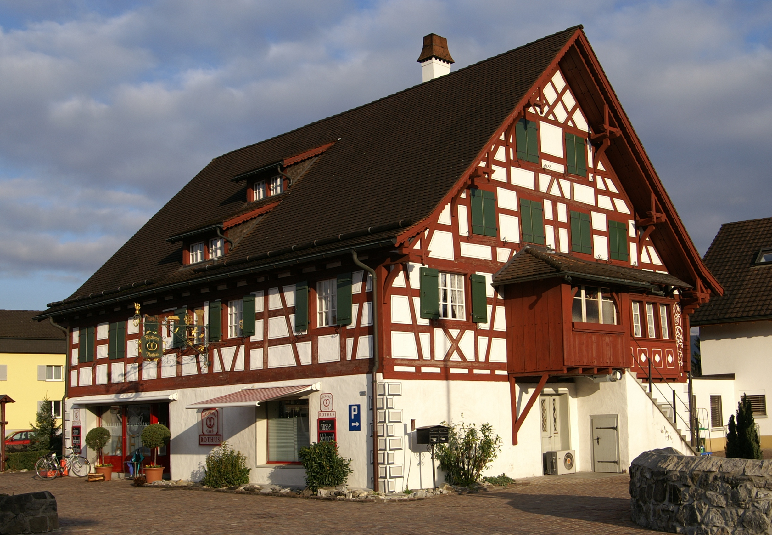 Fachwerkhaus Rothus (Westseite: Bäckerei-Konditorei - Nordseite: Eingang zum Gemeindemuseum) im Zentrum von Eichenwies; politische Gemeinde Oberriet im Rheintal.